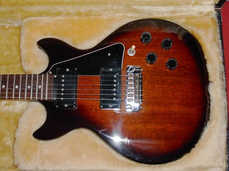 Gordon-Smith GSII